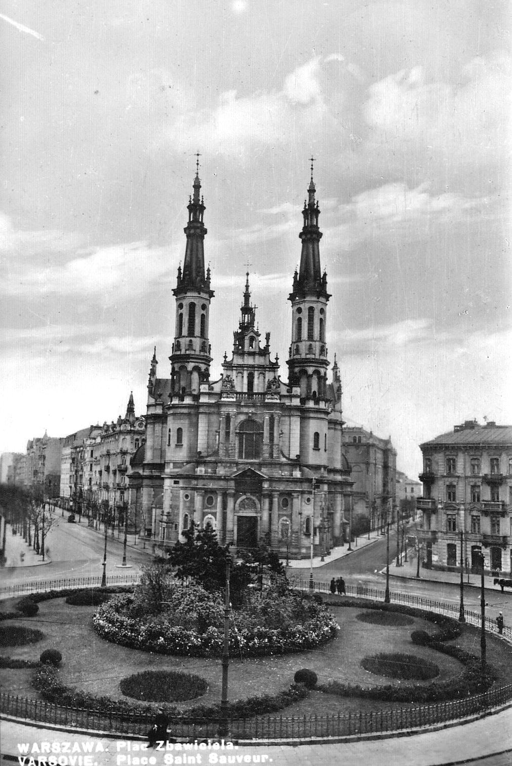 Plac Zbawiciela w Warszawie